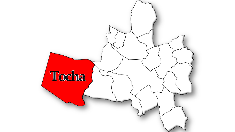 População